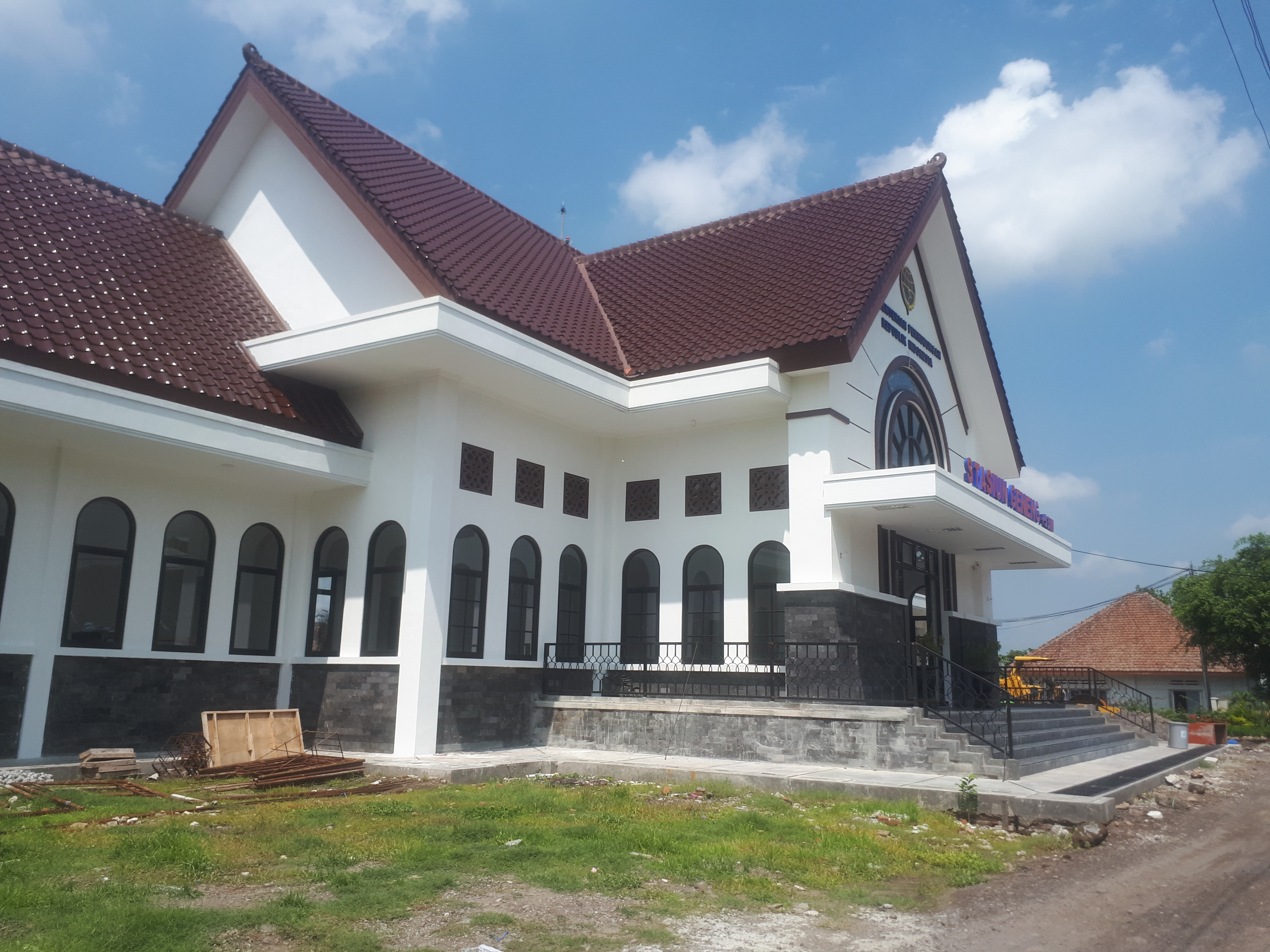 Bangunan baru Stasiun Geneng mulai beroperasi pada 30 Oktober 2019 bersamaan dengan aktivasi rel jalur ganda Stasiun Babadan dan Stasiun Geneng.